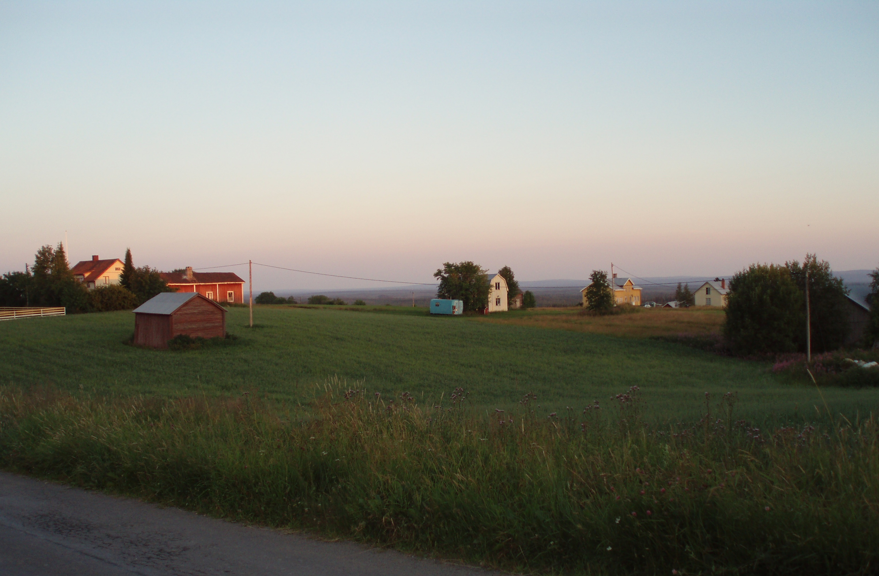 Vy över